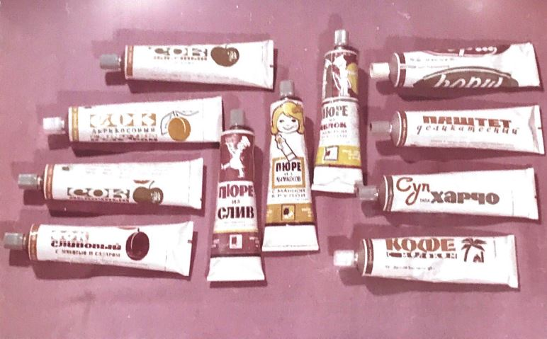 Космическое питание